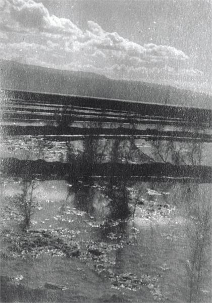 בית הערבה - שטיפות קרקע.